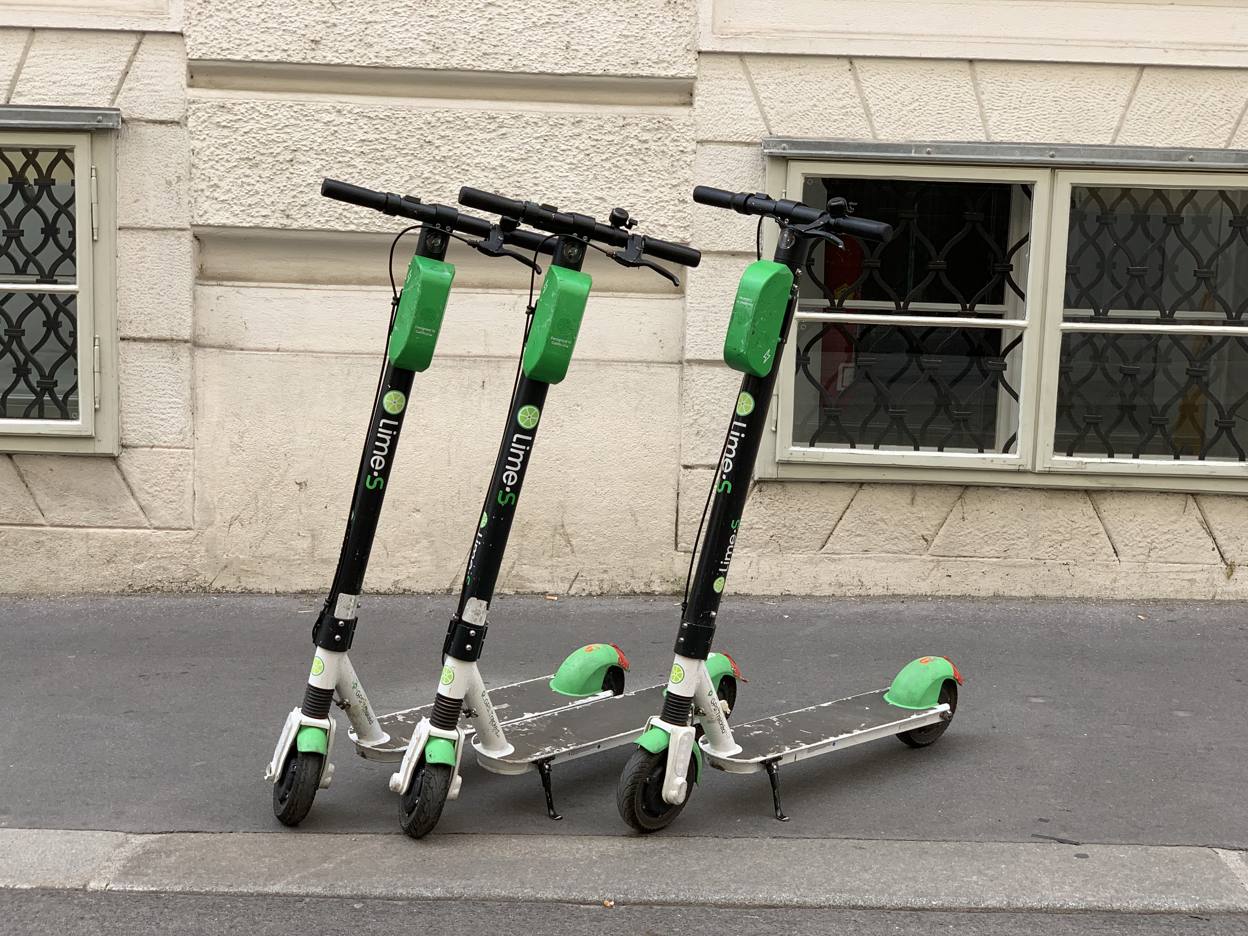 Trois trottinettes électriques Lime, Himmelpfortgasse, Vienne.